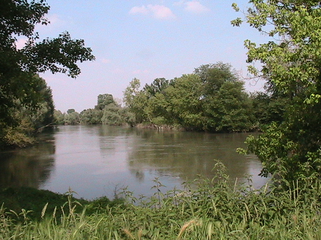 Villarocca - Il fiume Oglio